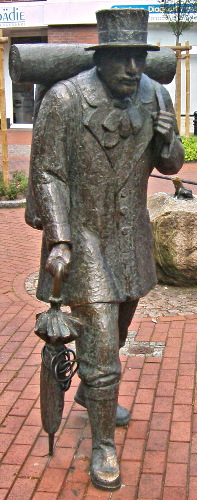 Packenträgerdenkmal in Neuenkirchen. Bronzestandbild geschaffen von Gertrud Büscher-Eilert. Standort: Neuenkirchen (Kreis Steinfurt), Fußgängerzone, Hauptstraße